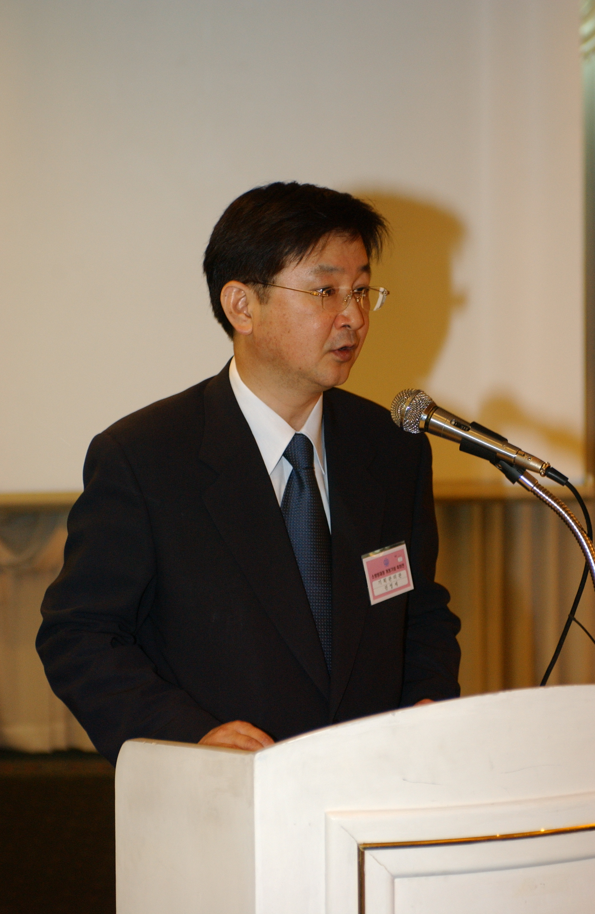 권영세(영어: Kwon Youngse)가 2004년 6월 권욱 소방방재청장 취임식에서 축사를 하고 있다.